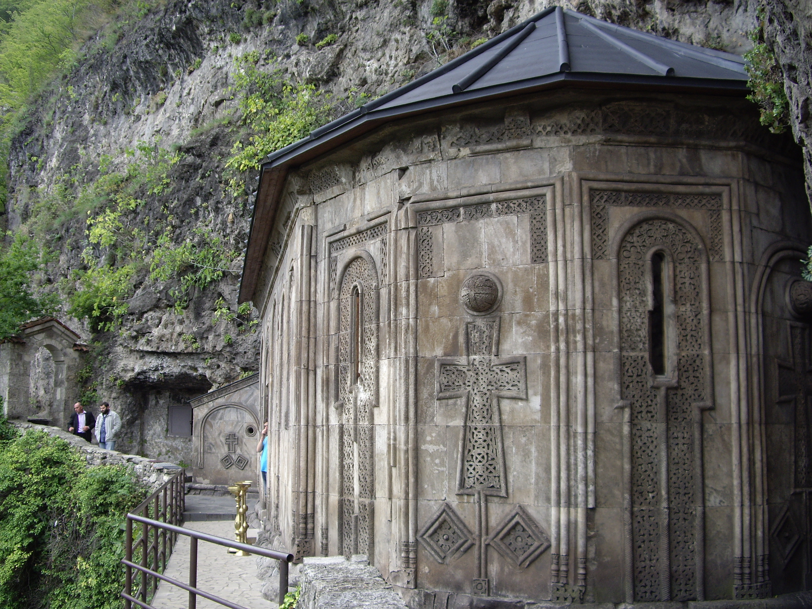 მღვიმევის დიდი ტაძრის აღმოსავლეთი ფასადი